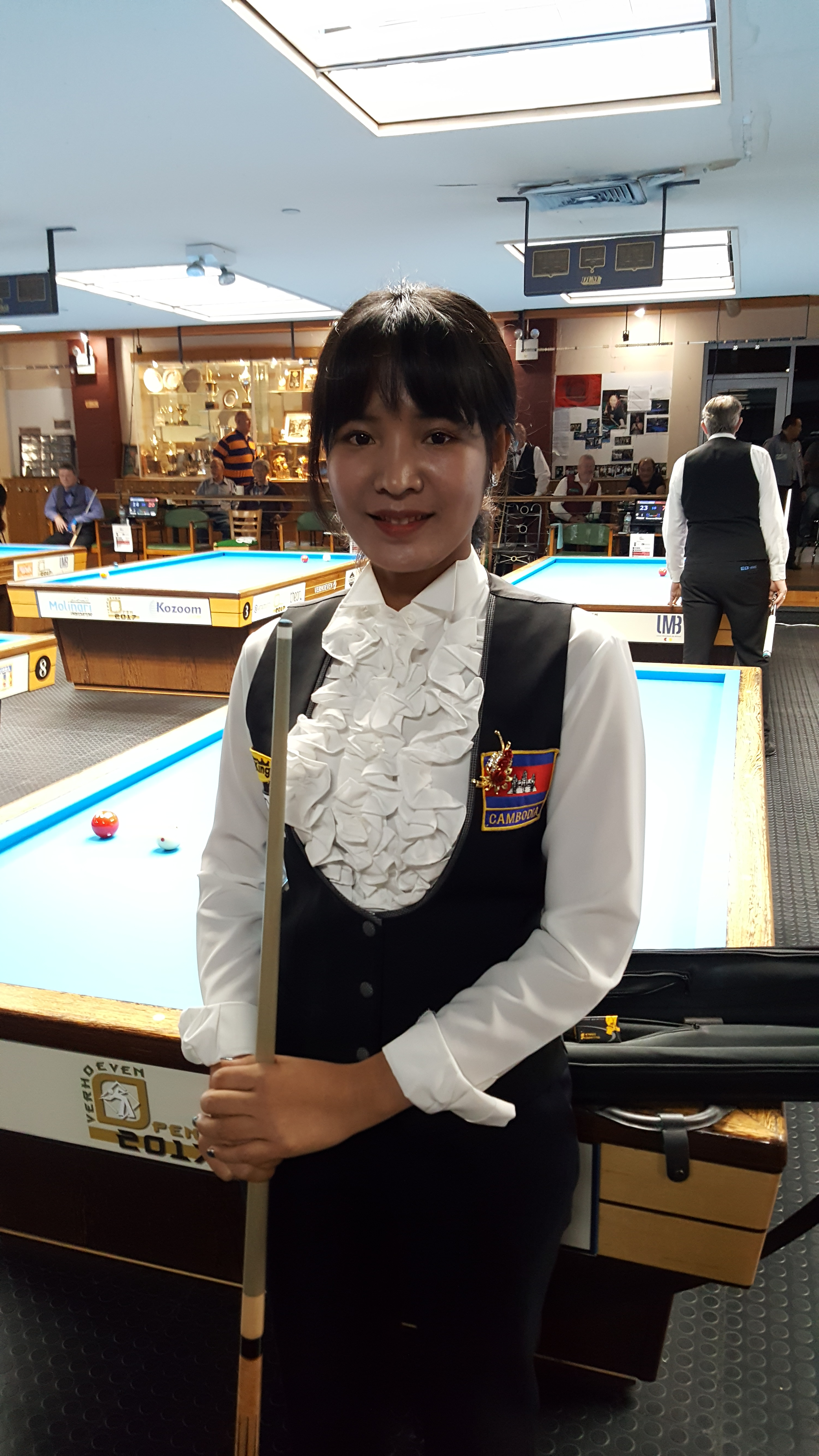 see file name